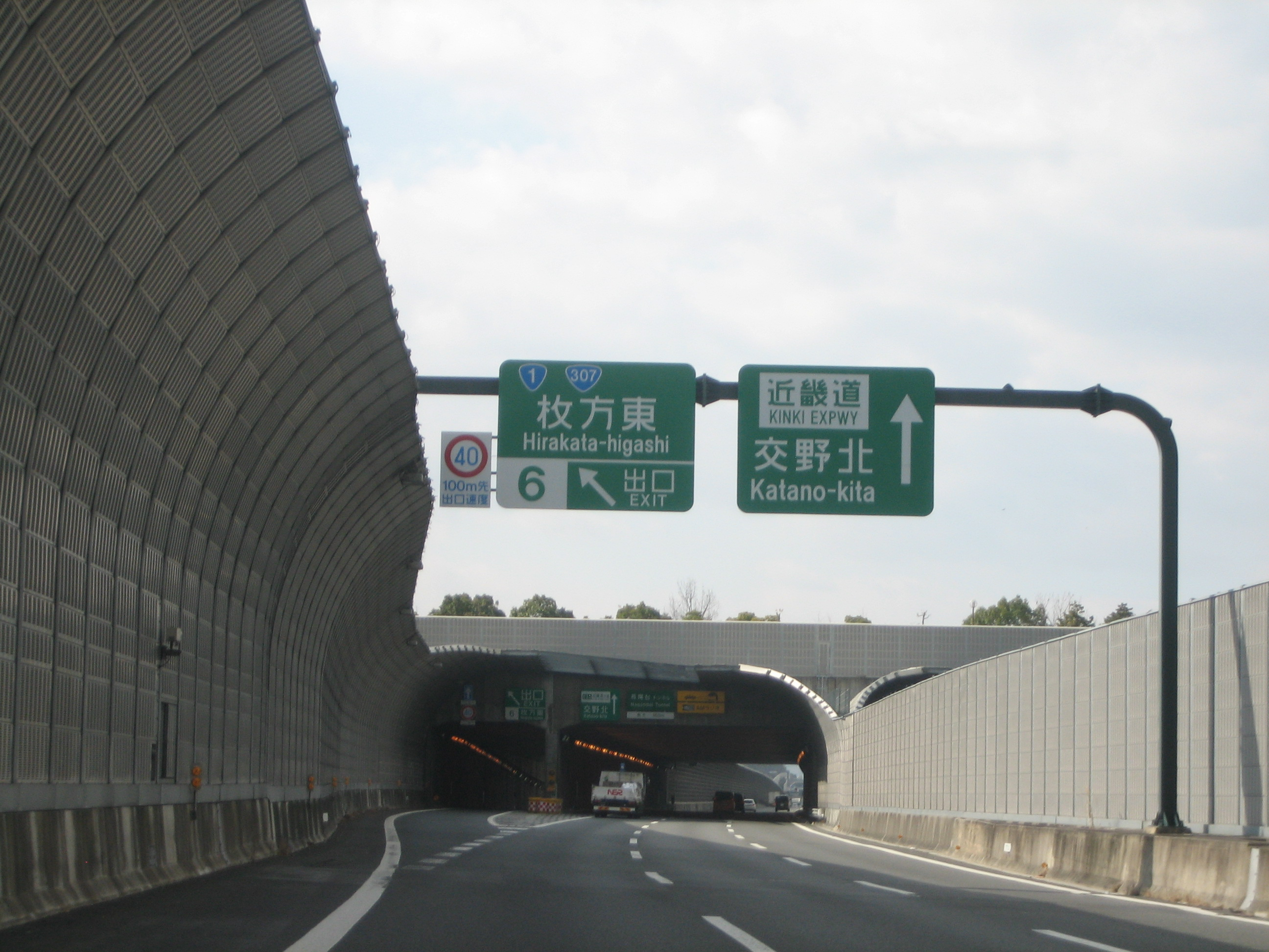 枚方東IC